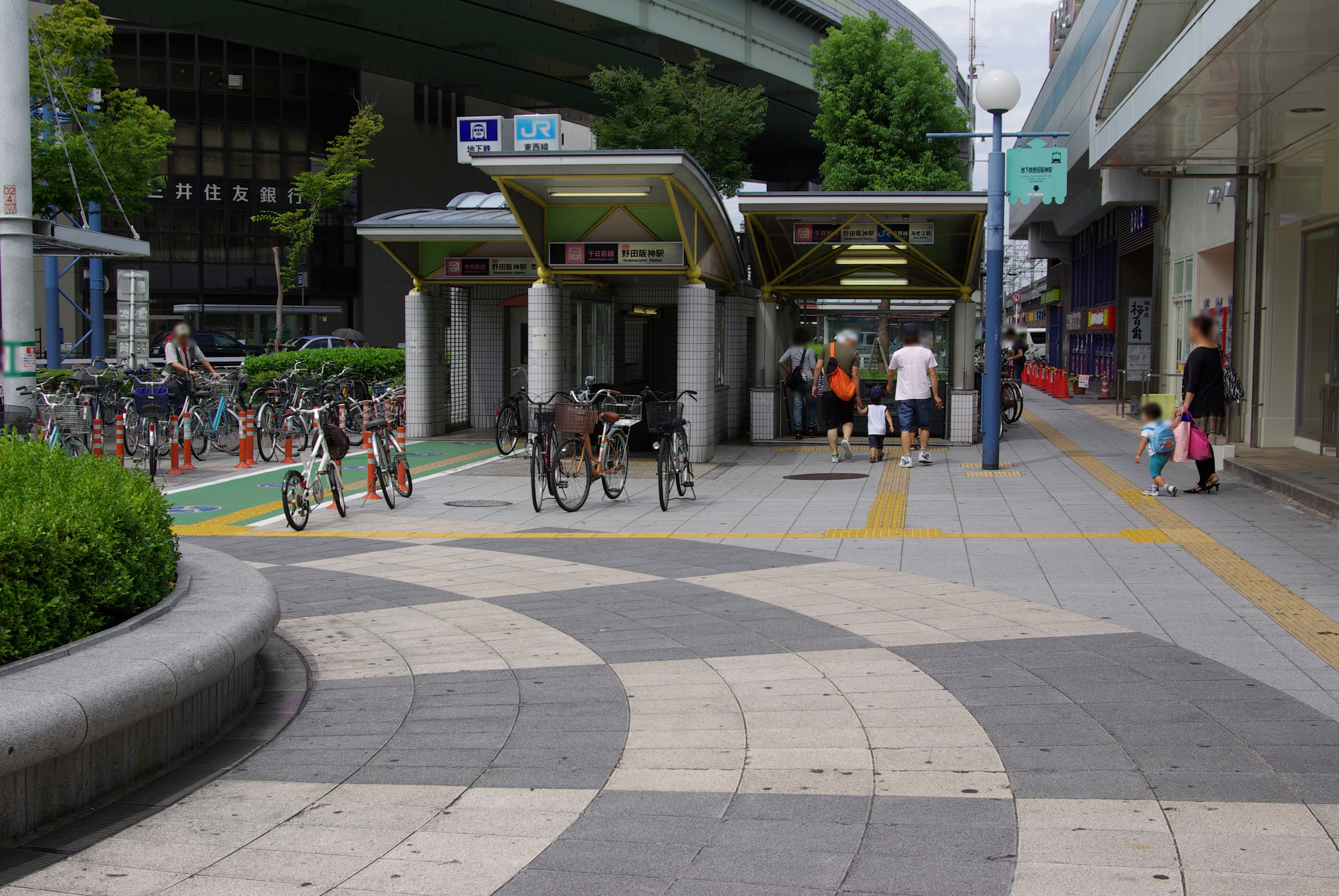 大阪市交通局千日前線野田阪神駅